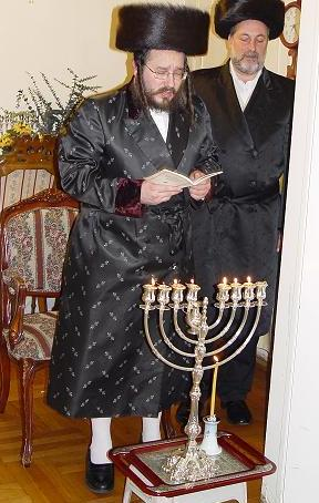 Grand Rabbi Aaron Rabinowitz on Hanukah